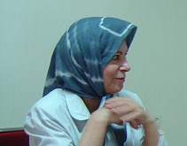 Monireh Fahmi, honora prezidantino de IREA.